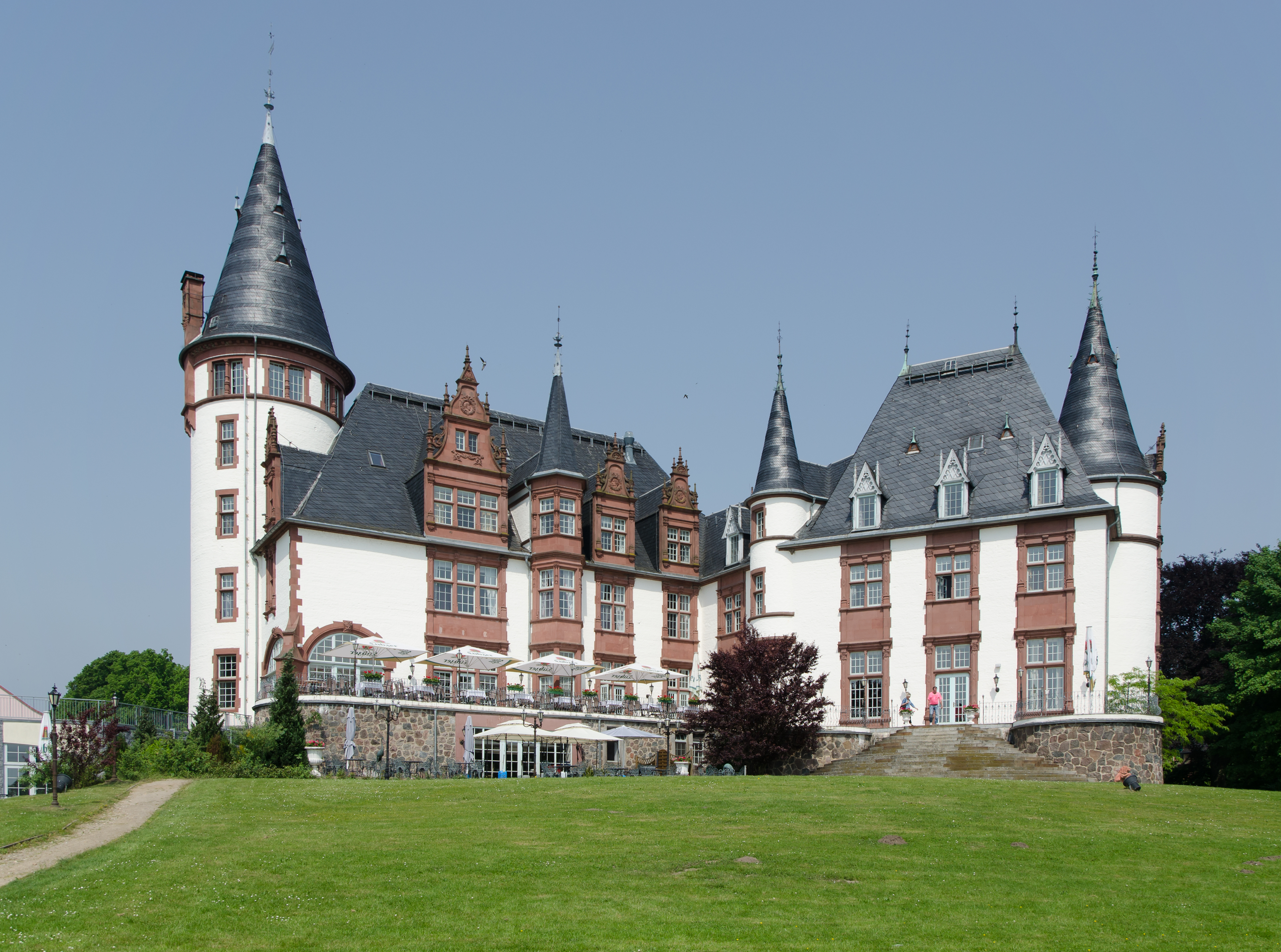 Schloss Klink von der Seeseite